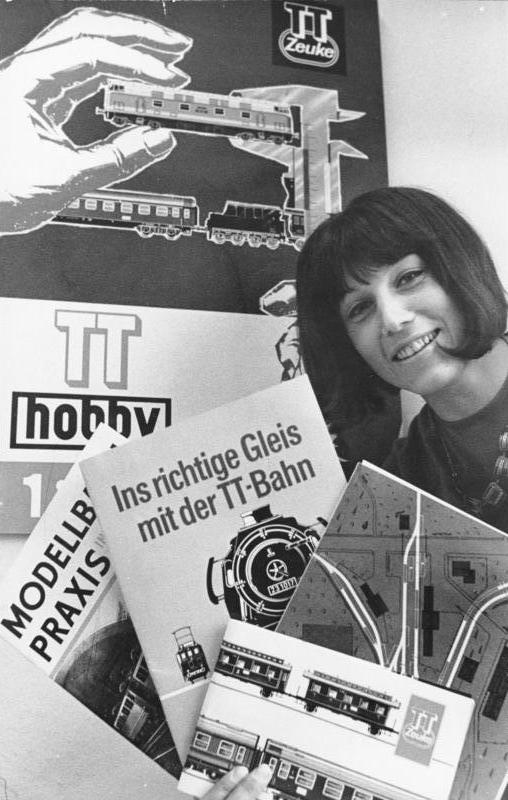 TT-Eisenbahnen der Firma Zeuke & Wegwerth KG ADN-ZB/Deutsche Demokratische Republik. Spielzeug für die Kleinen-Hobby für die Großen sind die TT-Eisenbahnen der Firma Zeuke & Wegwerth KG. Seit Ende des zweiten Weltkrieges produziert dieser Berliner Betrieb elektrische Eisenbahnen. Er begann zunächst mit einer Spur 0, produzierte dann die Spur H0 mit einem Maßstab 1:87 und richtete danach sein Augenmerk auf die Herstellung der bekannten TT-Spurweite, die wegen des geringen Kurvenradius die günstigste Spurbreite für den Bahnbetrieb auf der Tischplatte bietet. Im Jahre 1956 nahm die Firma eine staatliche Beteiligung auf. Herr Zeuke wurde damit Komplementär und Leiter dieser Kommanditgesellschaft, in der der Staat als Geldgeber auftritt. In den 15 Jahren der Tätigkeit als halbstaatlicher Betrieb hat sich die Zeuke & Wegwerth KG zu einem leistungsstarken Produzenten entwickelt. In Abstimmung mit den staatlichen Spielzeugproduzenten spezialisierte sie sich auf die TT-Modelleisenbahn. Eine moderne Produktionsstätte in der Hauptstadt der DDR Berlin trägt den Anforderungen des Inlands- und Exportmarktes Rechnung. K1126/327-330N